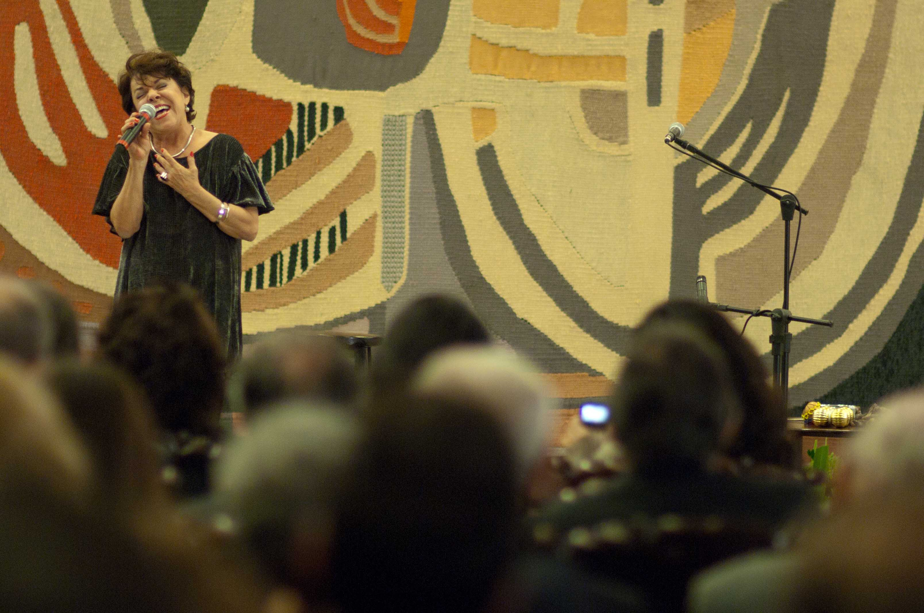 A cantora Miucha, irmã de Chico Buarque, homenageou Vinícius de Moraes na Cerimônia que elevou o compositor a Embaixador Post-Morten Foto: Pedro França/MinC